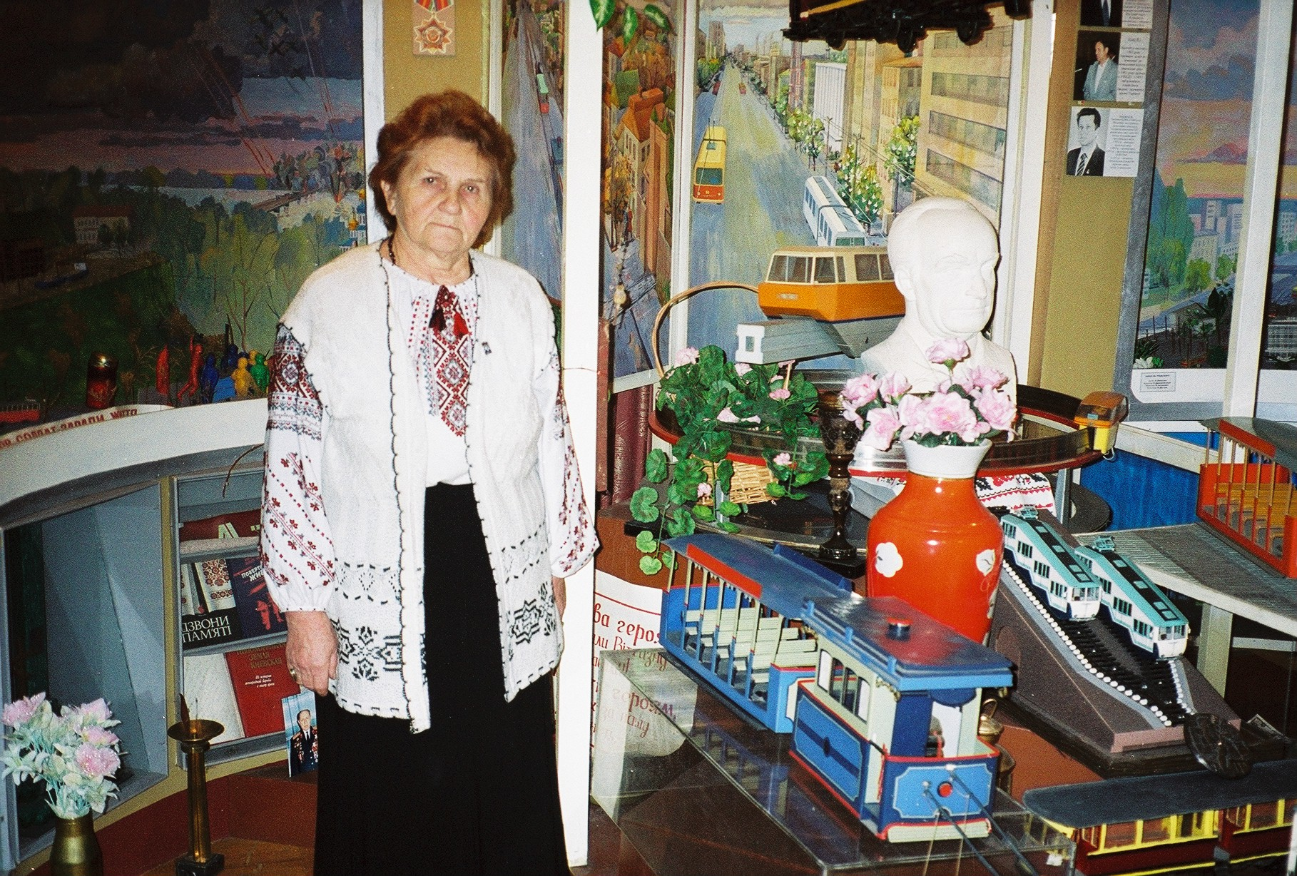 Ливинская Лидия Архиповна (конец 2000-х)